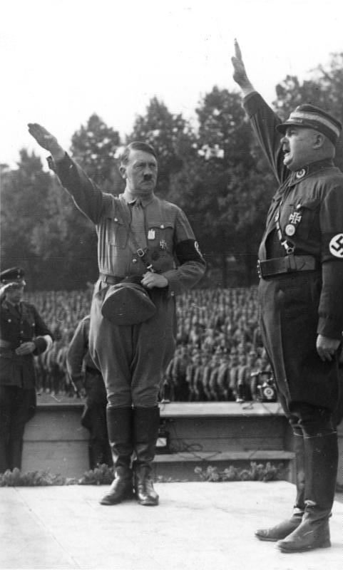 Nürnberg: Stabschef Röhm meldet die SA an Hitler, Reichsparteitag 1933